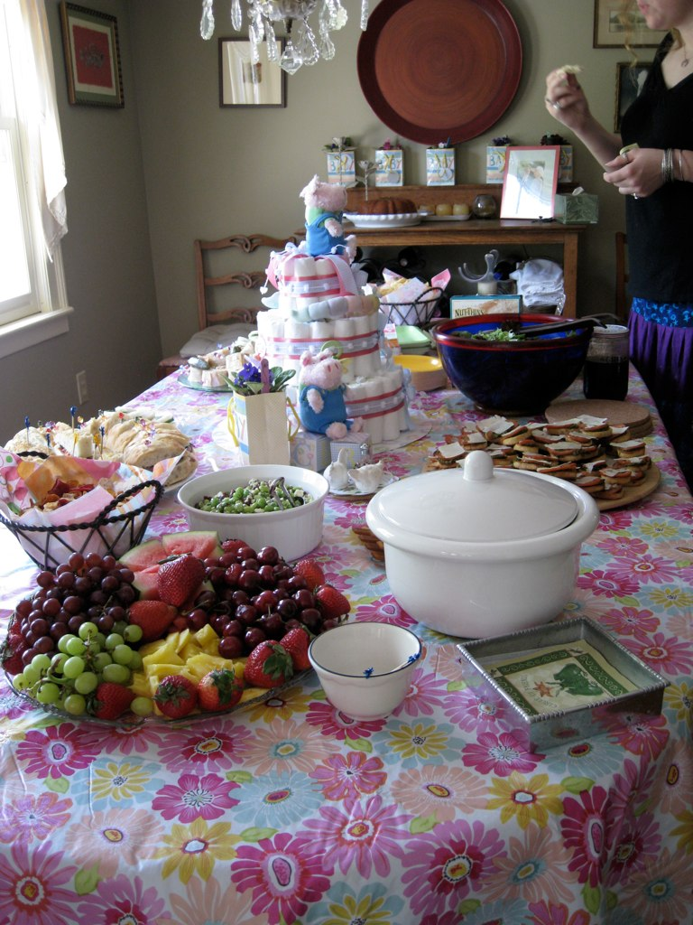 Kuchen- und Speisenbuffet bei einer Babyparty (englisch Baby shower), mit einer Windeltorte (engl. Diaper Cake) als „Tischdekoration“.